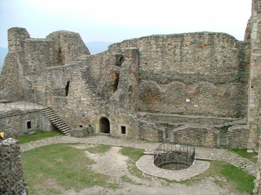 Neamţ Citadel, Târgu Neamţ, Romania